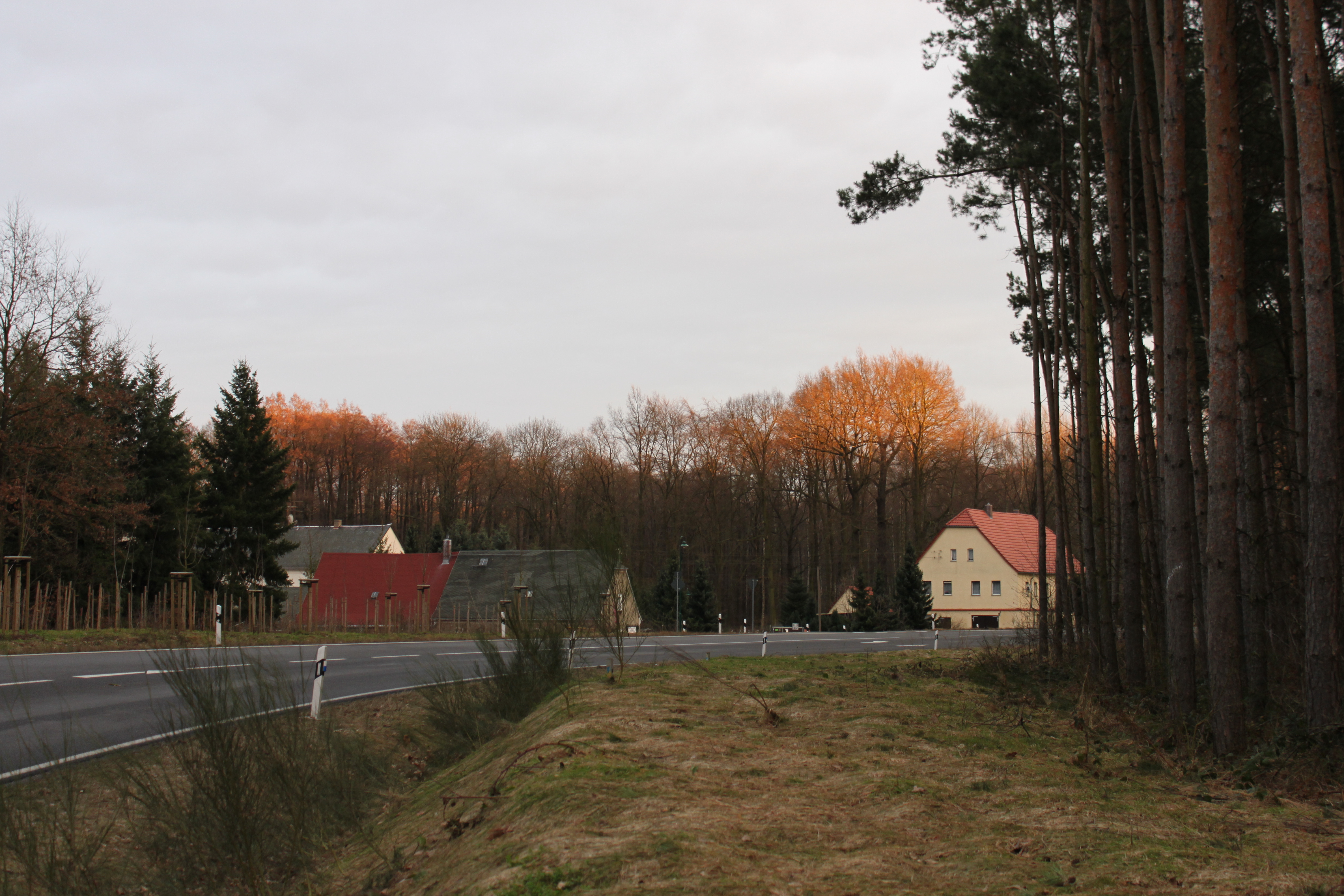 Pfeifholz